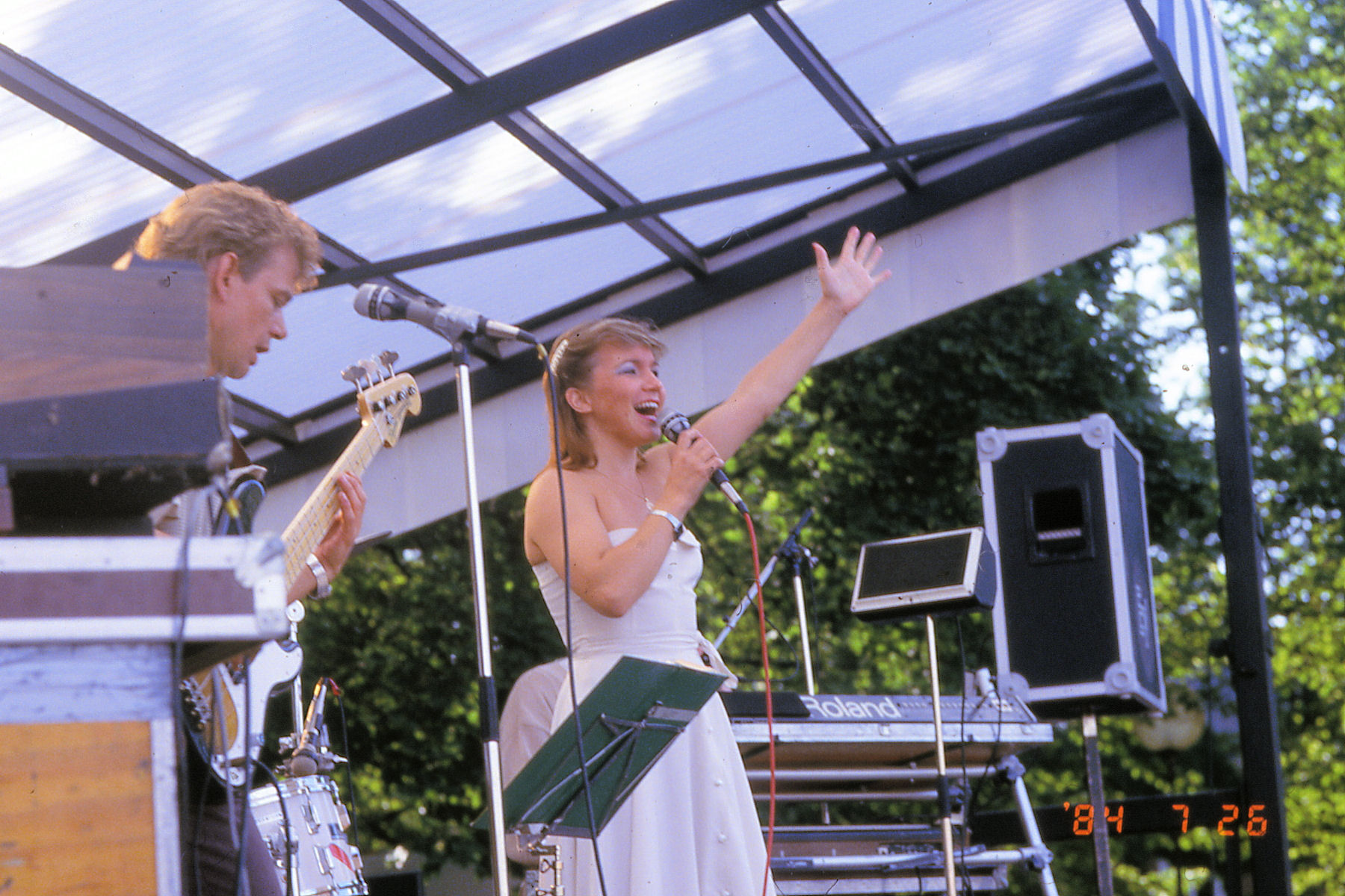 Tarja Ylitalo finnish singer